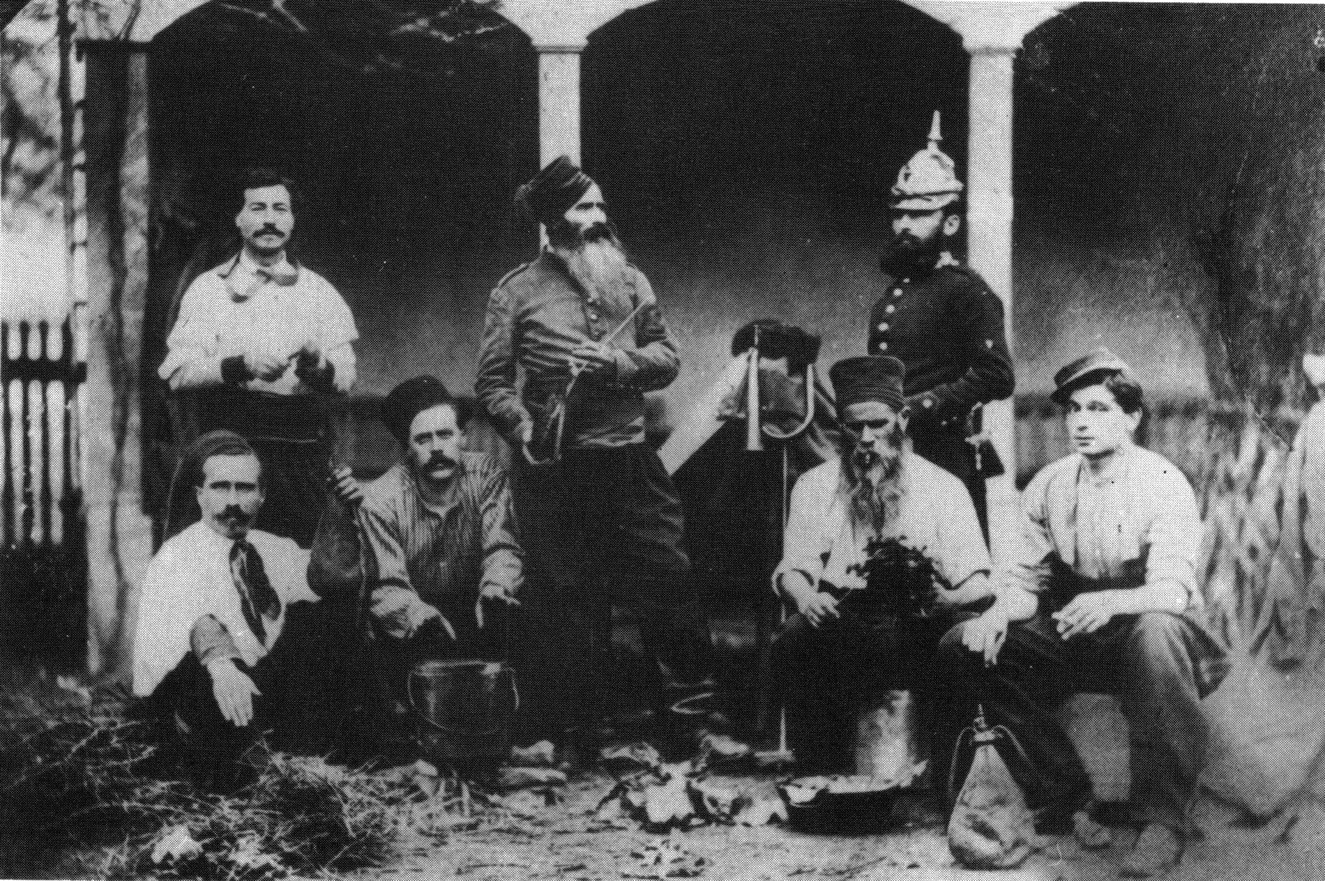 Chasseurs d'Afrique dopo Sedan, sorvegliati da un soldato del Baden